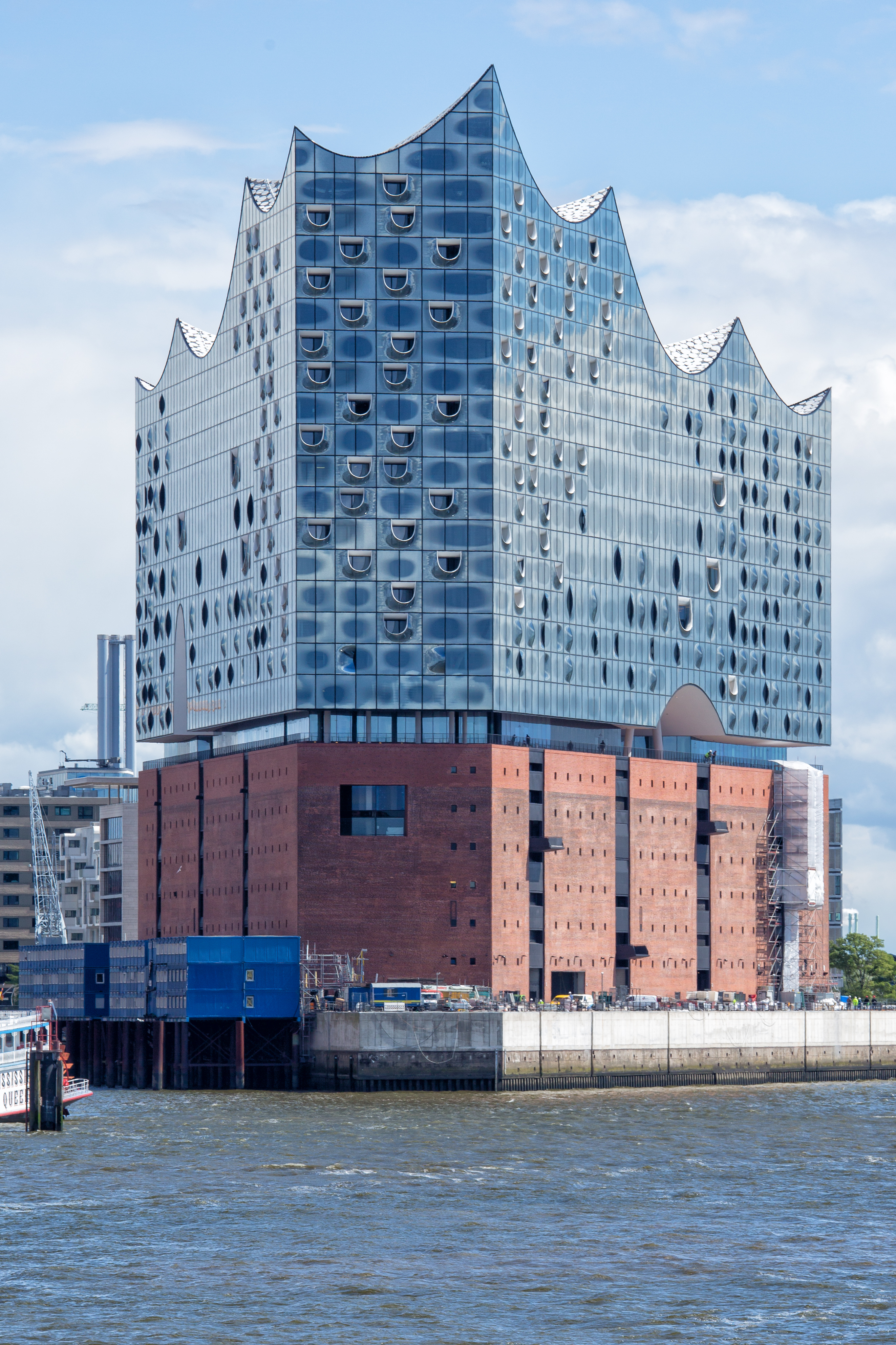 Blick auf die Frontseite der Elbphilharmonie